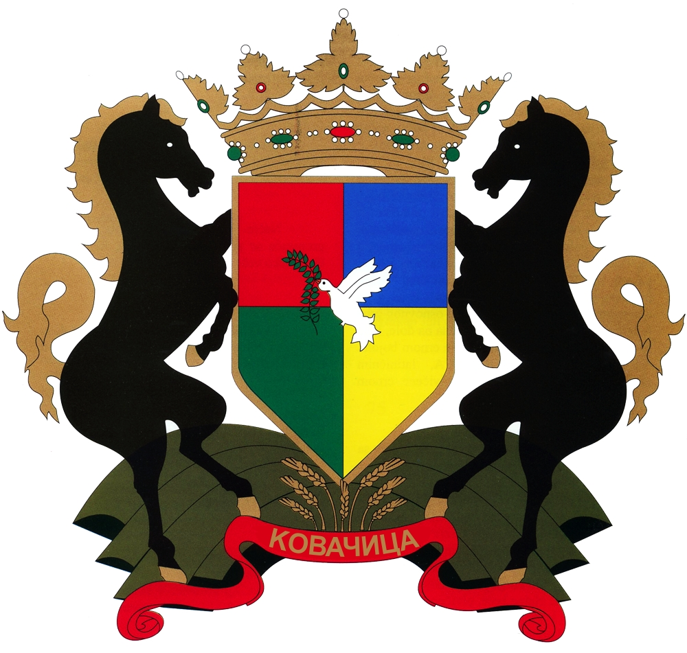 Blason de la ville de Kovačica, en Serbie (province autonome de Voïvodine